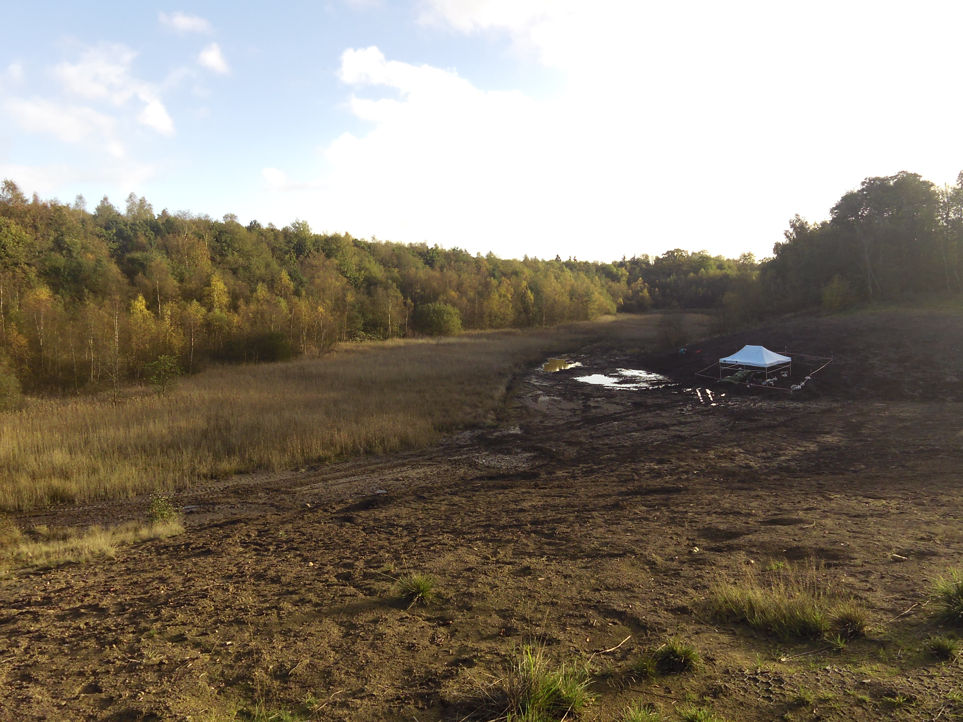 Gram Lergrav 2018. Til højre ses et hold arkæologer fra Museum Sønderjylland igang med udgravning af nogle hvalknogler de stødte på i løbet af sommeren.